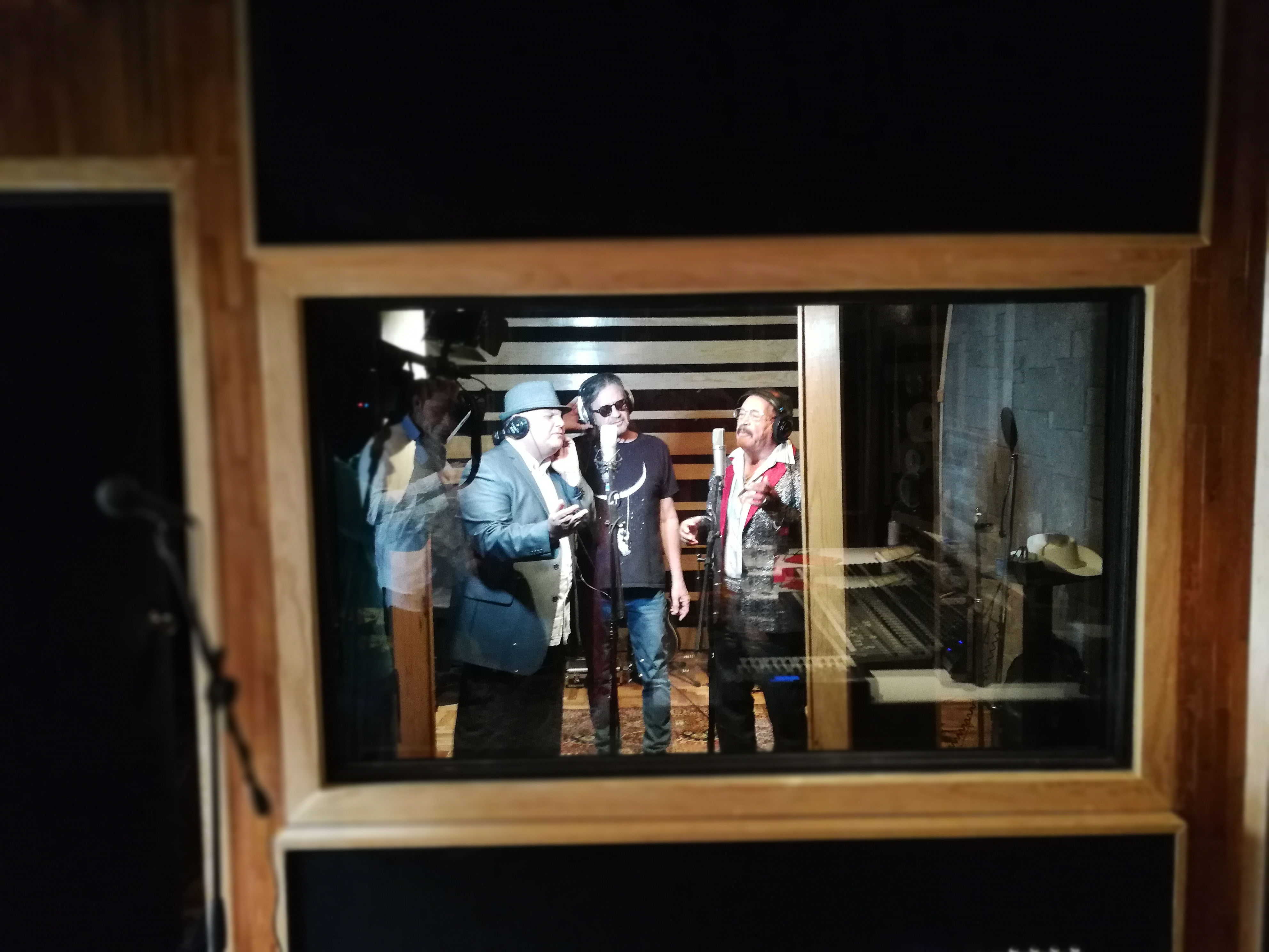 b